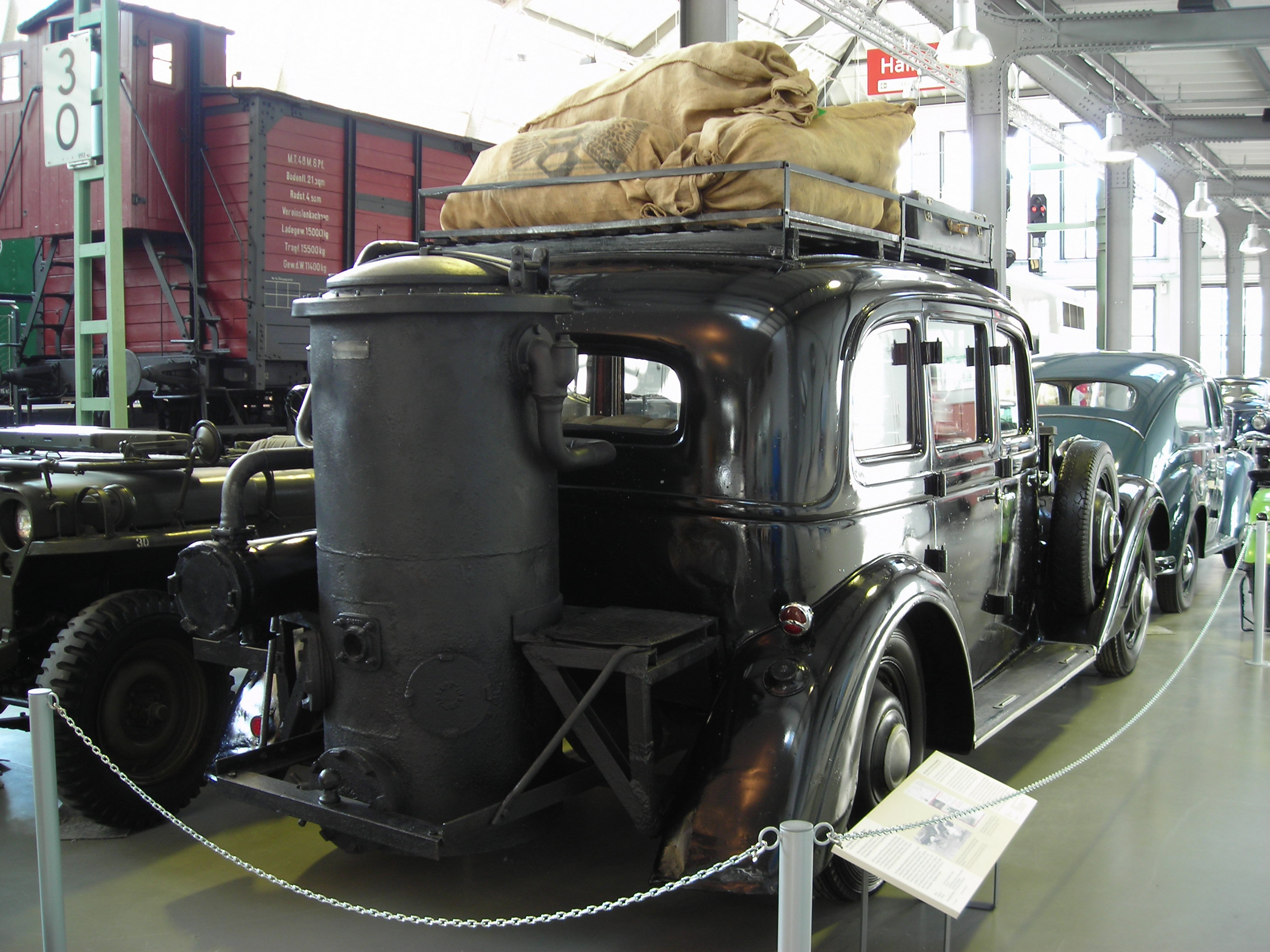 Adler Diplomat 3 GS mit Holzgasgenerator - Adlerwerke, Frankfurt am Main 1938, 1941 aufgrund Benzinknappheit mit Imbert-Generator versehen, Antrieb über Kohlenmonoxid und Wasserstoff, 6-Zylinder-Viertaktmotor in Reihe (Leistung bei Gasbetrieb: 2914 cm³, 26 kW [36 PS], ca. 70 km/h max.), Exponat im Deutschen Museum Verkehrszentrum, Halle II, Inv.-Nr. 1984-0601